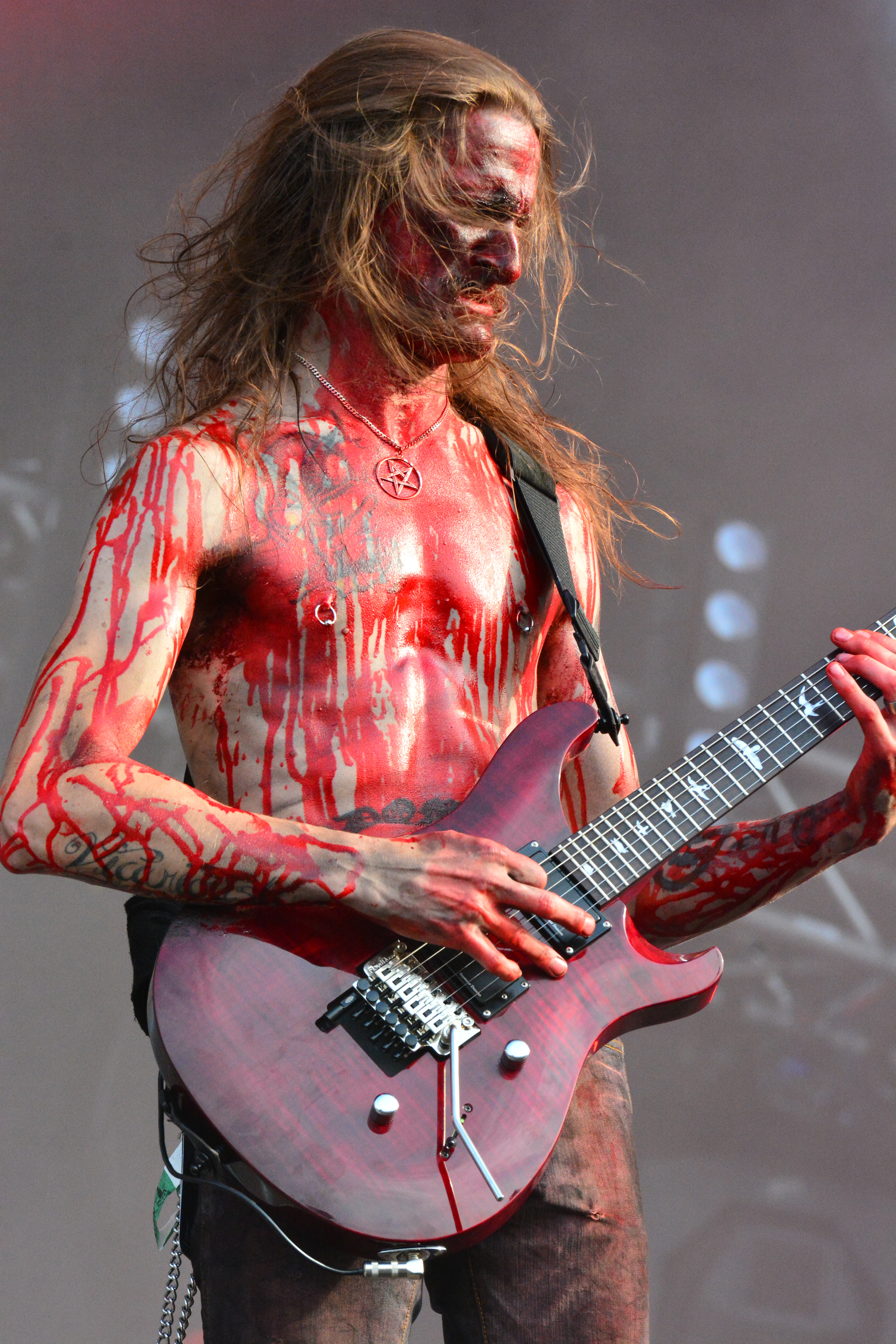 Bloodbath beim Wacken Open Air 2015